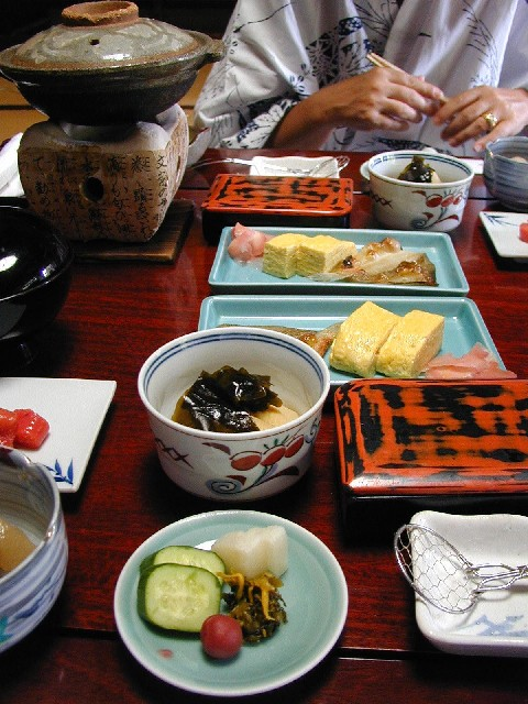 Colazione del mattino 2 (Nara - Giappone)